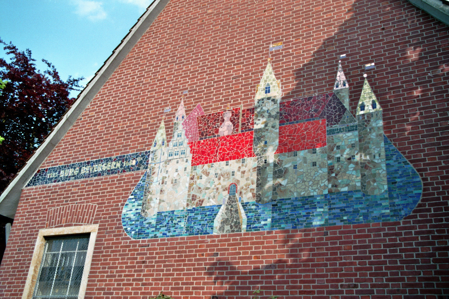 Mosaikbild der alten Burg Bevergern an der St.-Antonius-Grundschule in Bevergern, Nordrhein-Westfalen, Deutschland.